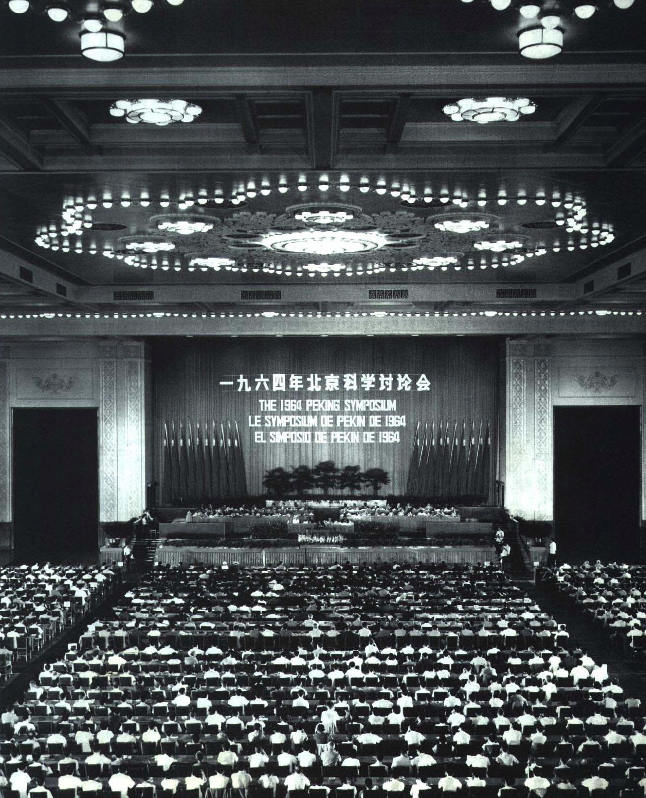 1964-10 1964年 北京科学讨论会开幕式